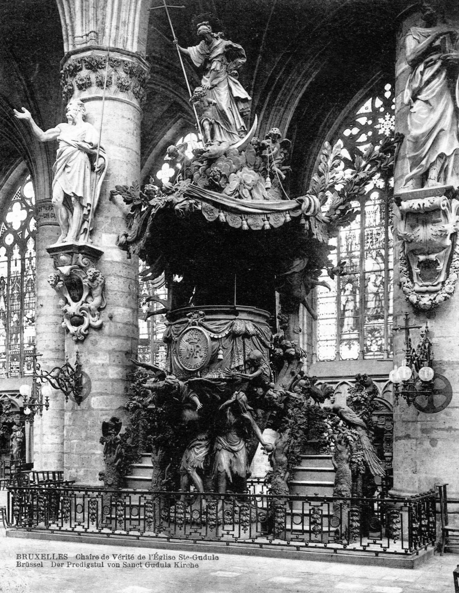 Carte Postale, BRUXELLES, Chaire de Verite de l’Eglise Ste-Gudule; Brüssel. Der Predigtstuhl(Kanzel) der Kirche Saints-Michel-et-Gundule, ein wundervolles Meisterschnitzwerk aus massivem Eichenholz. Dargestellt: Vertreibung von Adam und Eva aus dem Erdenparadies, und durch den Tod verfolgt. Dieses Kleinod der Holzschnitzerei wurde im Jahre 1699 von Hendrik Verbrüggen (um 1655-1724) aus Antwerpen der Kirche geschenkt und 1776 aufgestellt.